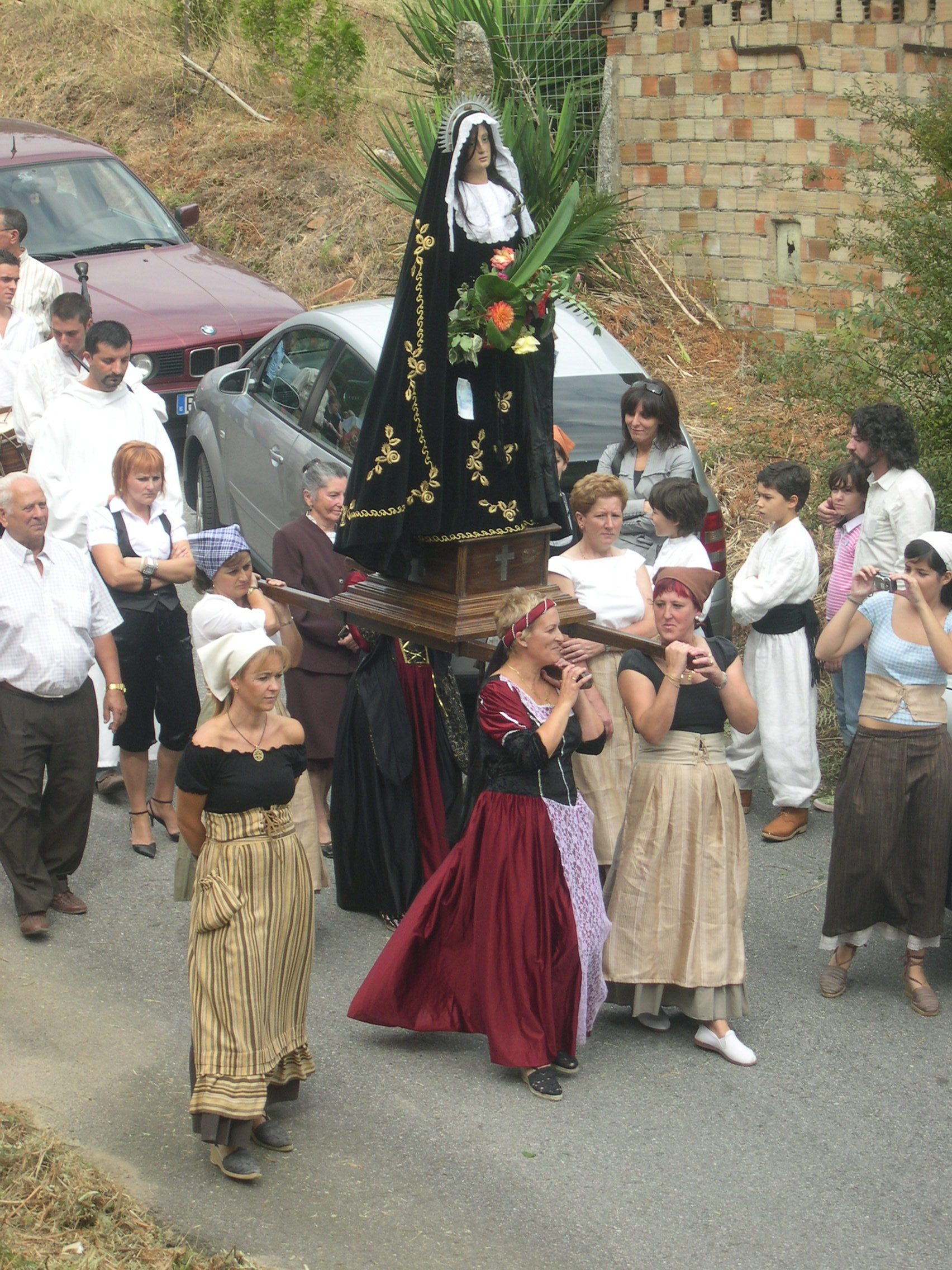 Procesión da Festa da Virxe das Dores en Bemil (Caldas de Reis)